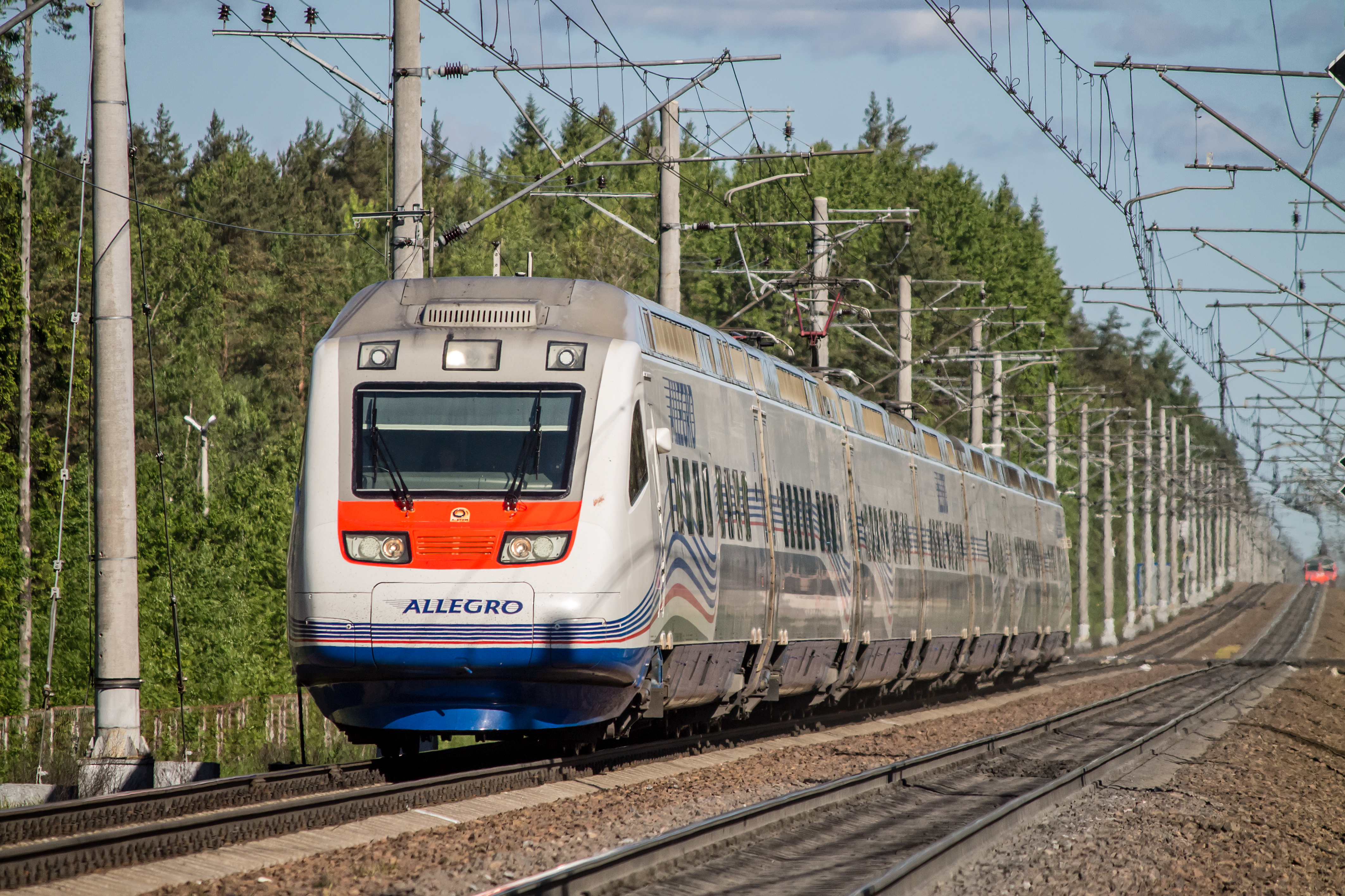 Sm6, Хельсинки - Санкт-Петербург, Рощино - Зеленогорск см. фото 694214 в альбоме автора